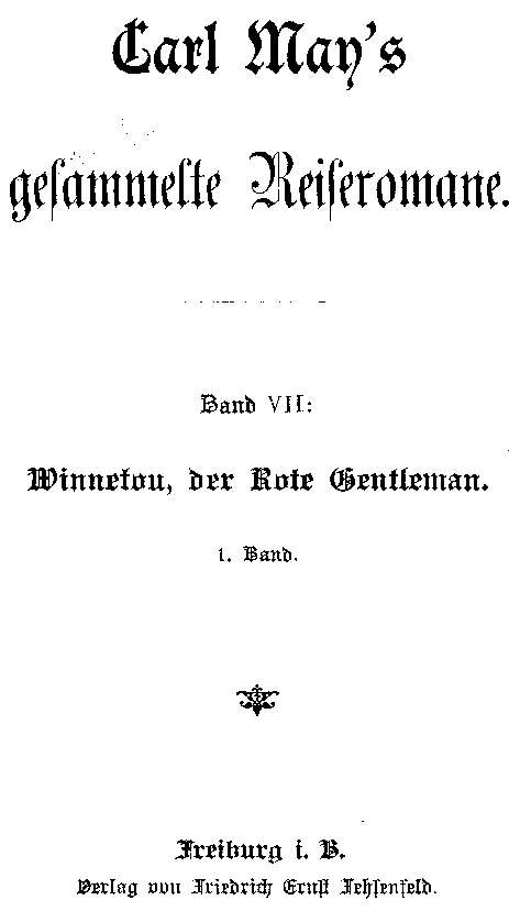 Cover der Originalausgabe von Winnetou I.